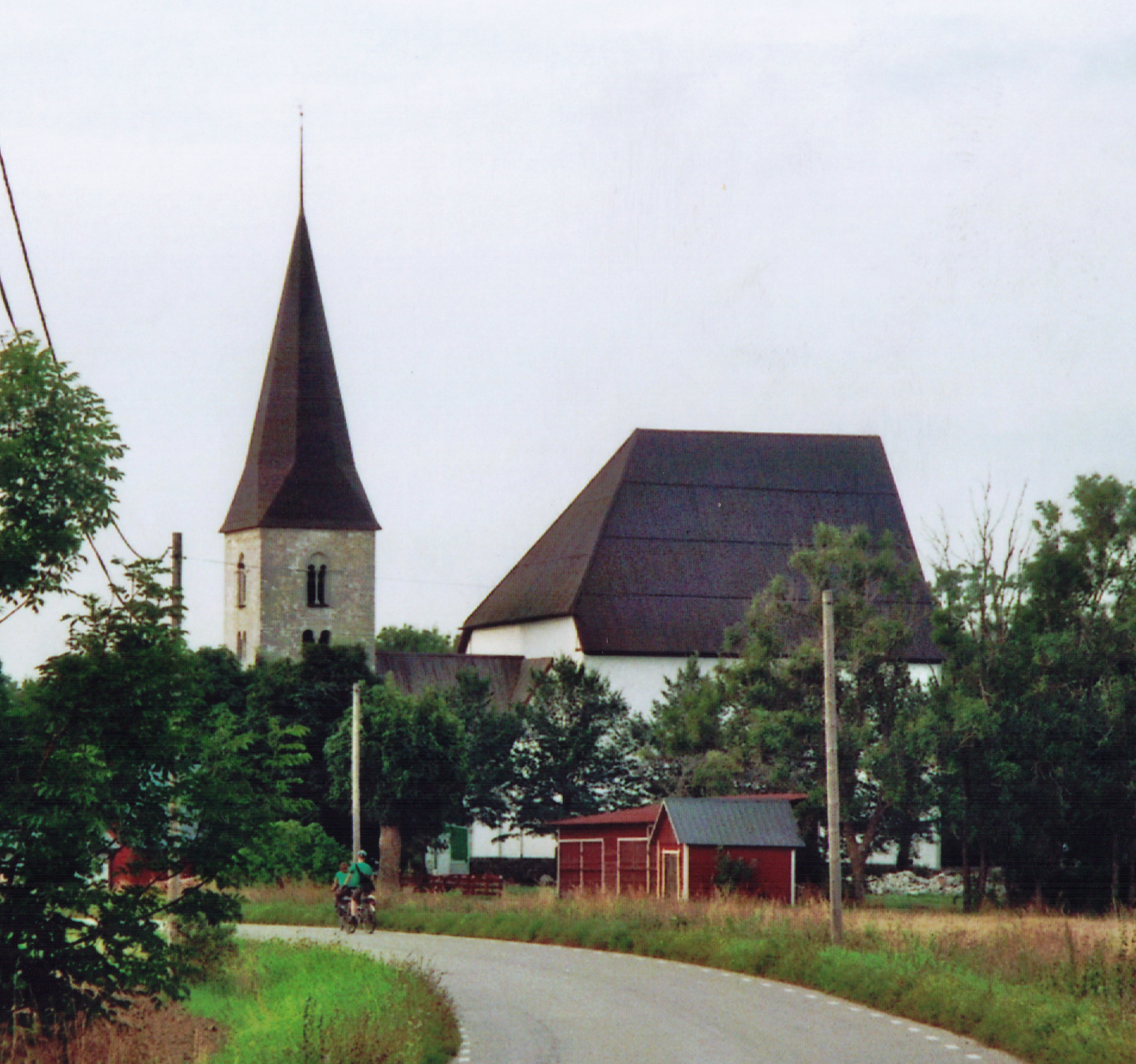 Kirche von Källunge, Gotland